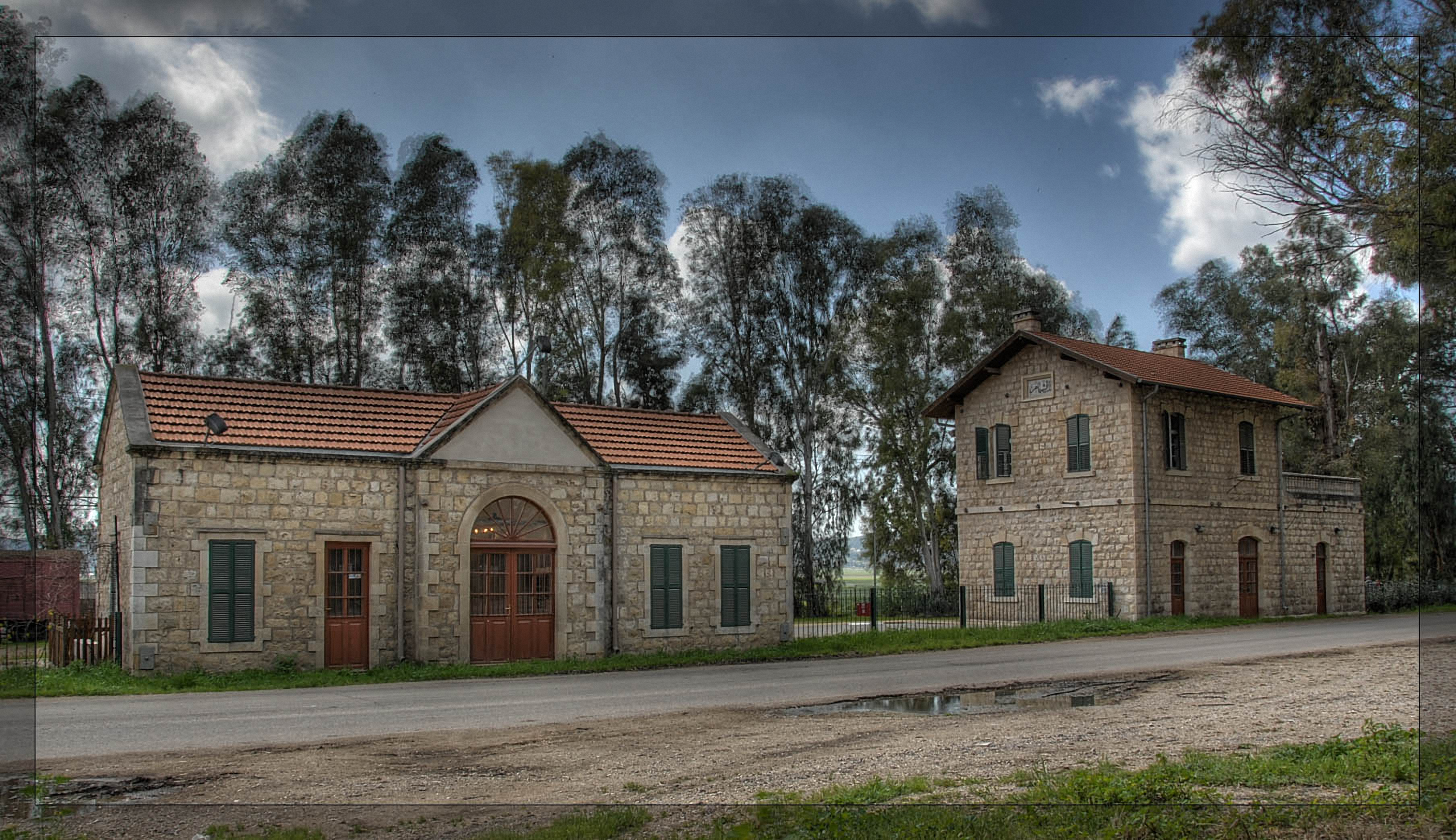 תחנת תל א-שמאם או כפר יהושע הייתה התחנה השלישית מבין שמונה התחנות המקוריות של רכבת העמק שנקבעו בשנת 1905. התחנה הכילה שמונה מבני אבן בסגנון גרמני אשר נמצאים במקום גם היום. המבנה המרכזי היה בן שתי קומות ובו שכנו משרדי התחנה. קומתו העליונה של מבנה זה שימשה כמקום מגוריה של משפחת מנהל התחנה. בפאתו המזרחית של בניין זה מצויה כתובת מסולסלת בערבית המציינת את שם התחנה. ממזרח למבנה המרכזי נבנה מגדל מים עגול אשר בו נשמרו המים למילוי הקטרים. שאר המבנים בתחנת כפר יהושע שימשו כמקום מגורי עובדי התחנה, שירותים ציבוריים לנוסעים, מחסן פחמים ובתיהם של הבומבג'י (מפעיל המשאבה, שיבוש ערבי של המקצוע הטורקי פומפג'י מ"פומפה" - משאבה) ושל קוון המסילה.